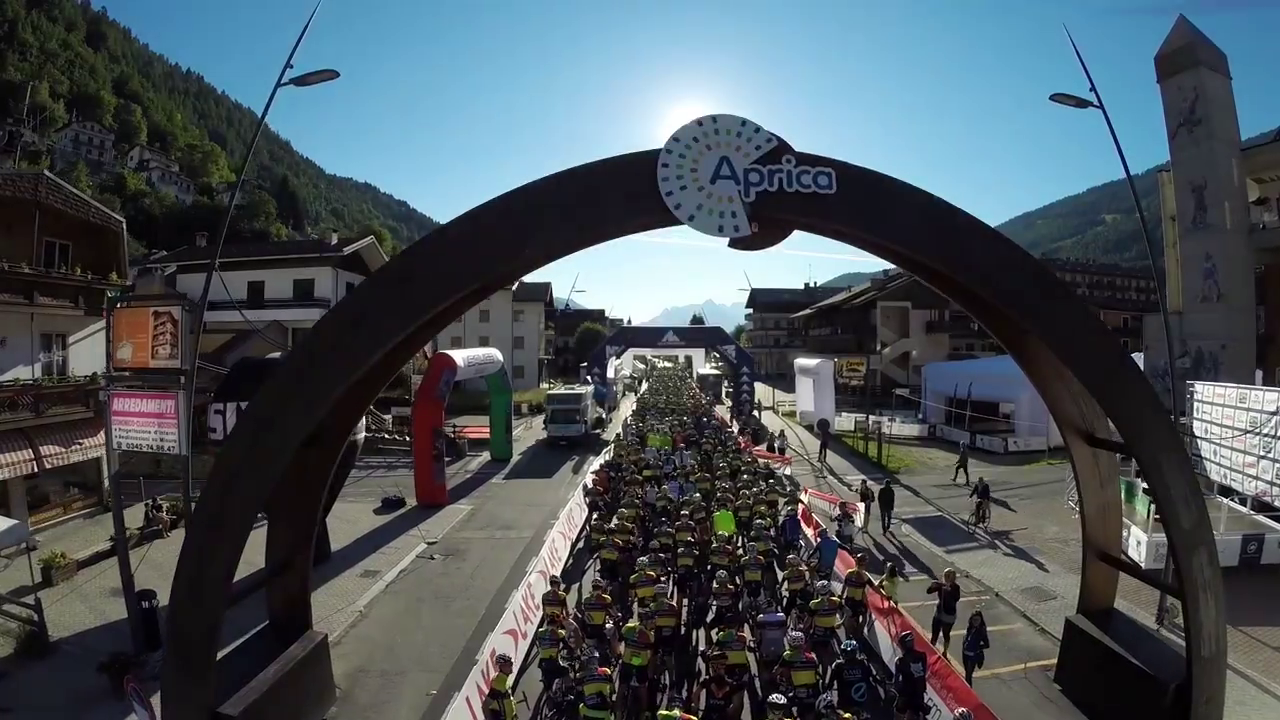 Partenza della Granfondo Gavia e Mortirolo - Aprica